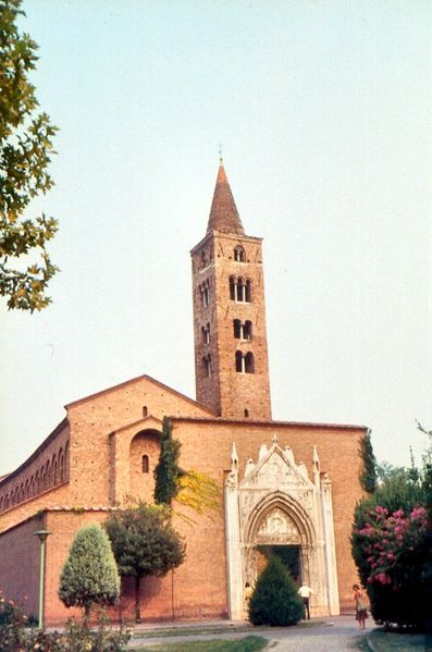 San Giovanni Evangelista, Ravenna